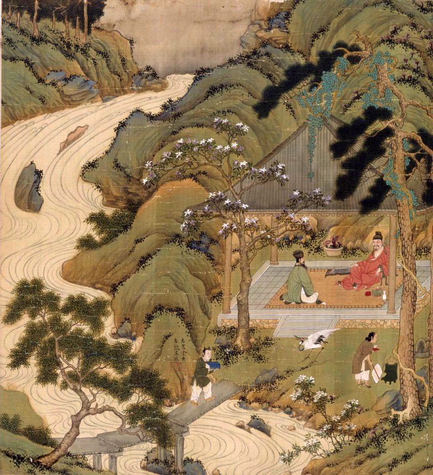 荊嶽臥病，時年四十三